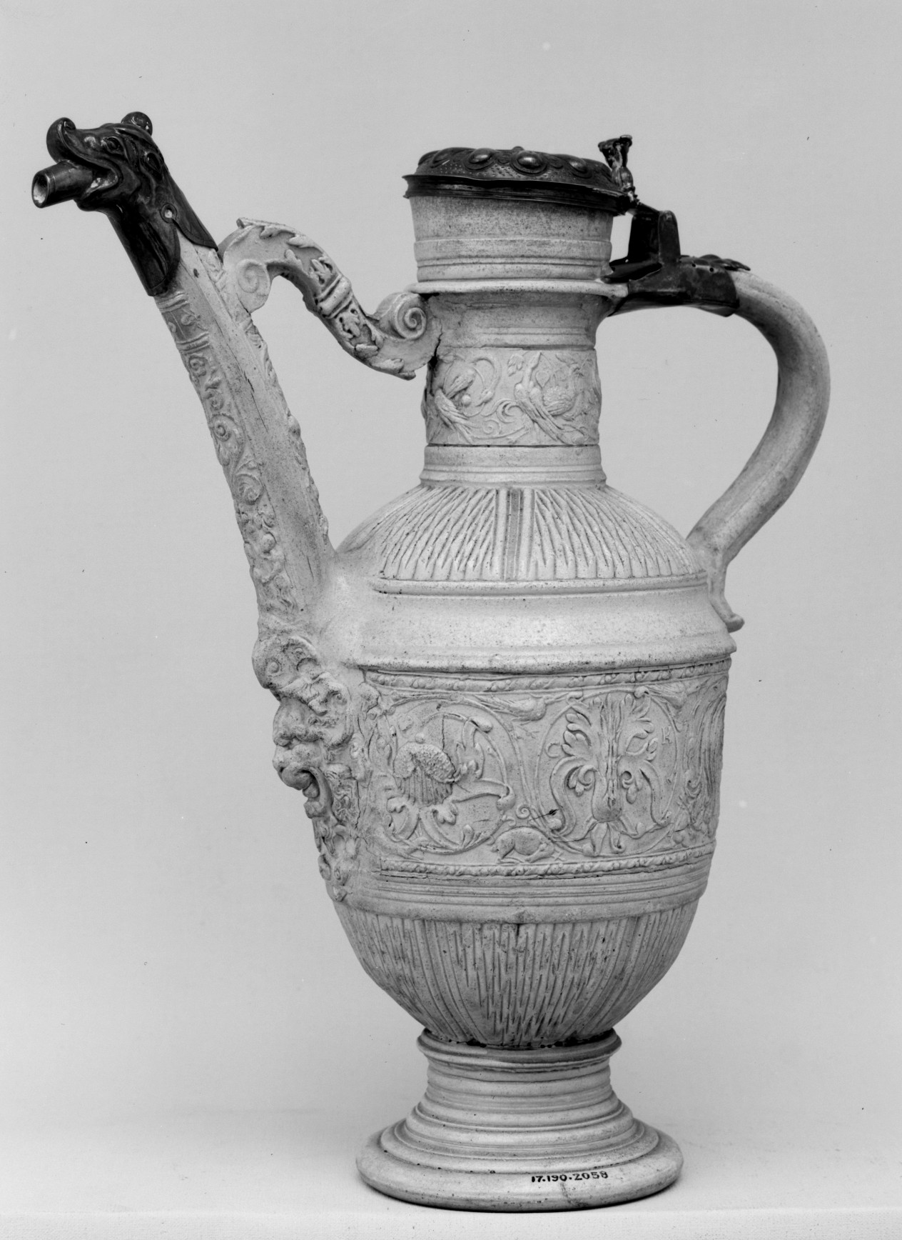 German, Siegburg; Ewer (Schnabelkanne); Ceramics-Pottery